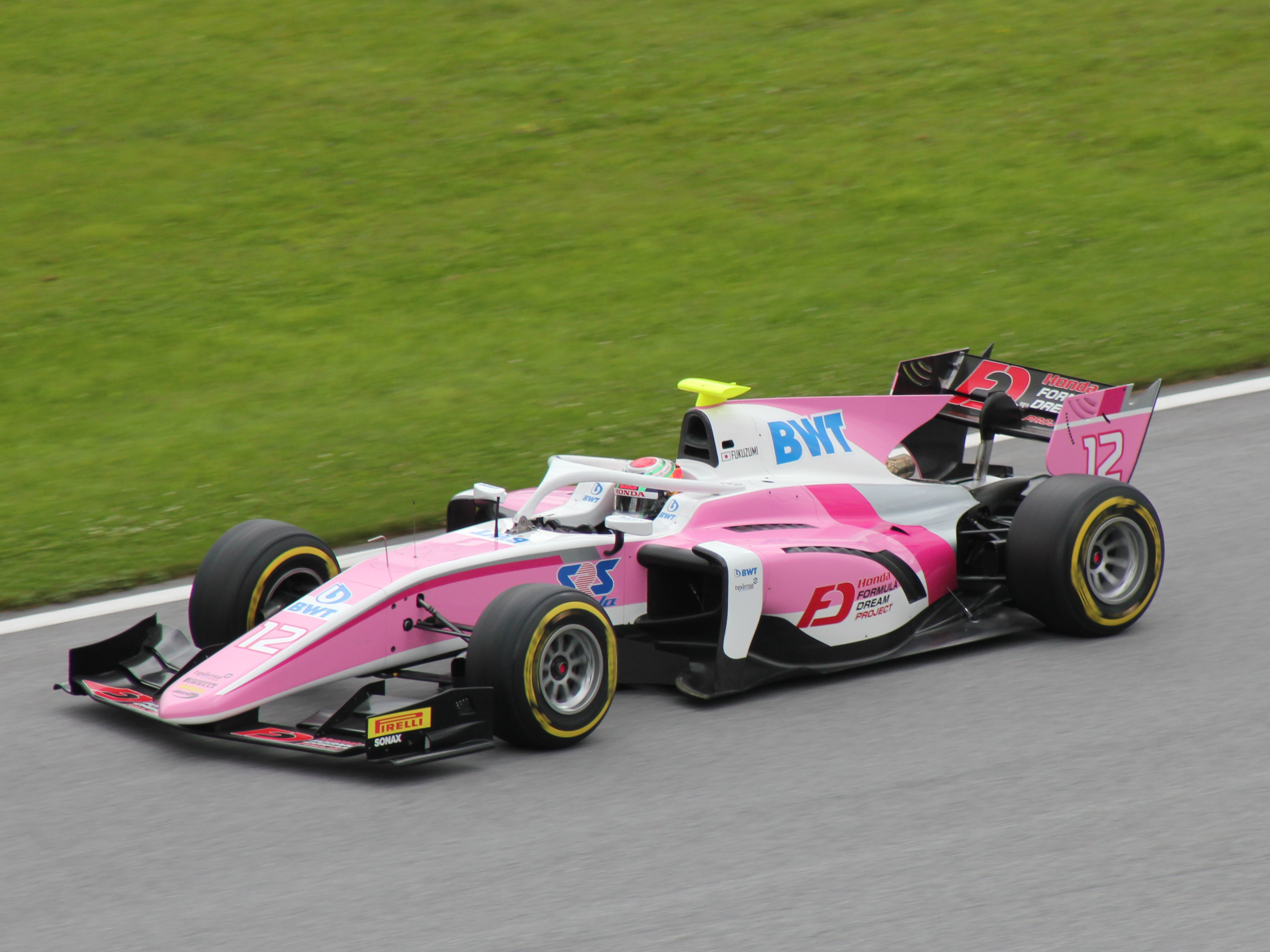 12 Nirei Fukuzumi beim Rennwochenende in Österreich 2018 (2)